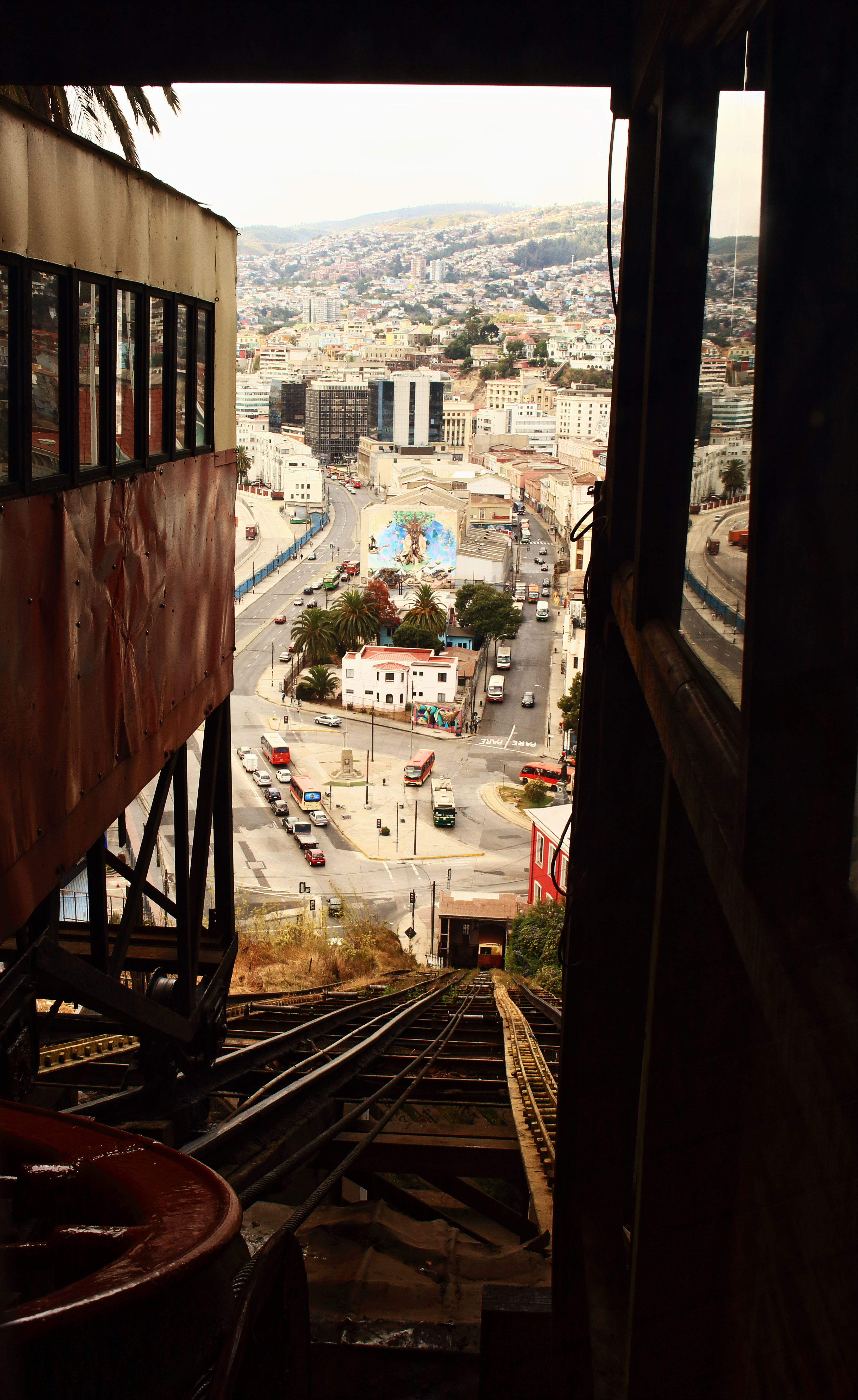 Vista parcial desde el ascensor Artillería de Valparaíso tomada en febrero de 2018